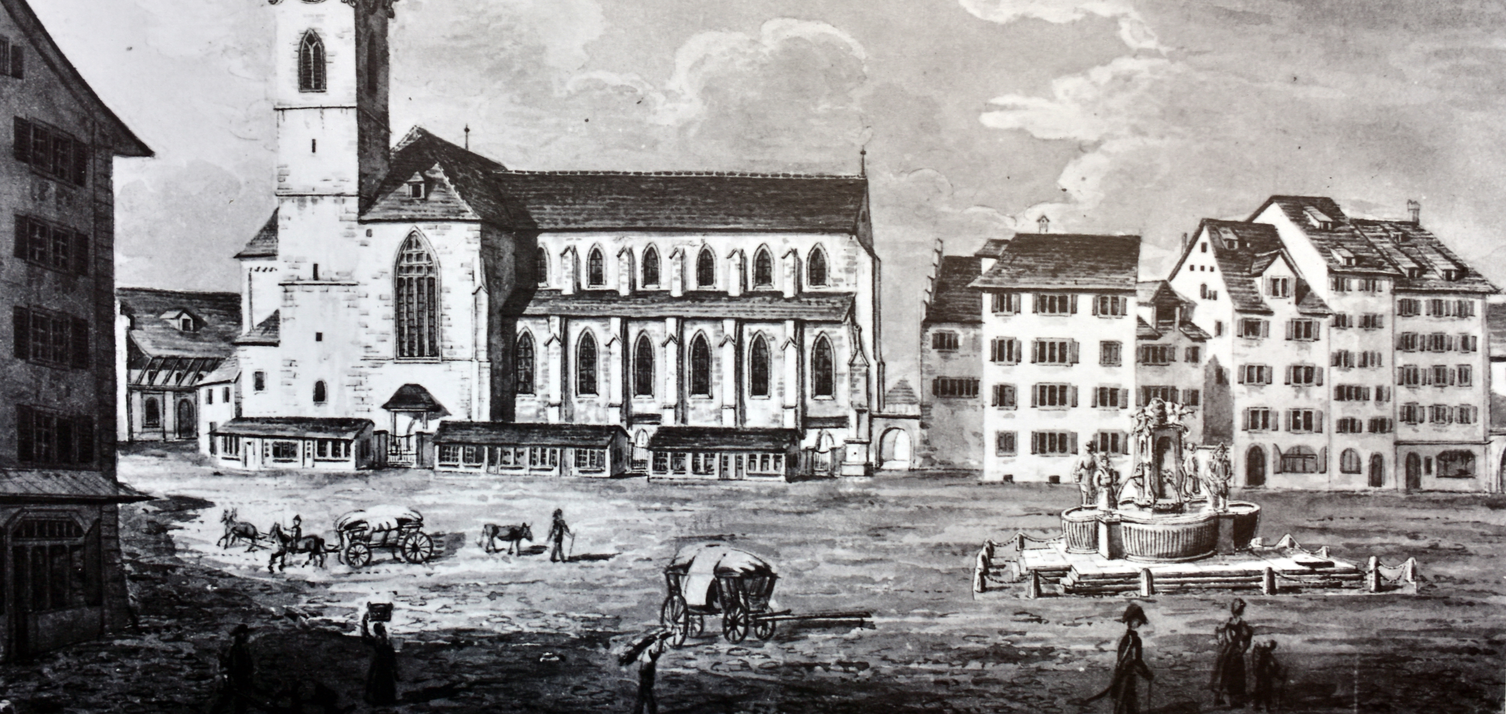 Münsterhof: Vom Markplatz zum Parkplatz zum Kulturplatz : Der Münsterhof mit dem 1811 abgebrochenen Neptun Brunnen. Emil Schulthess um 1835, Kunsthaus Zürich Grafische Sammlung.